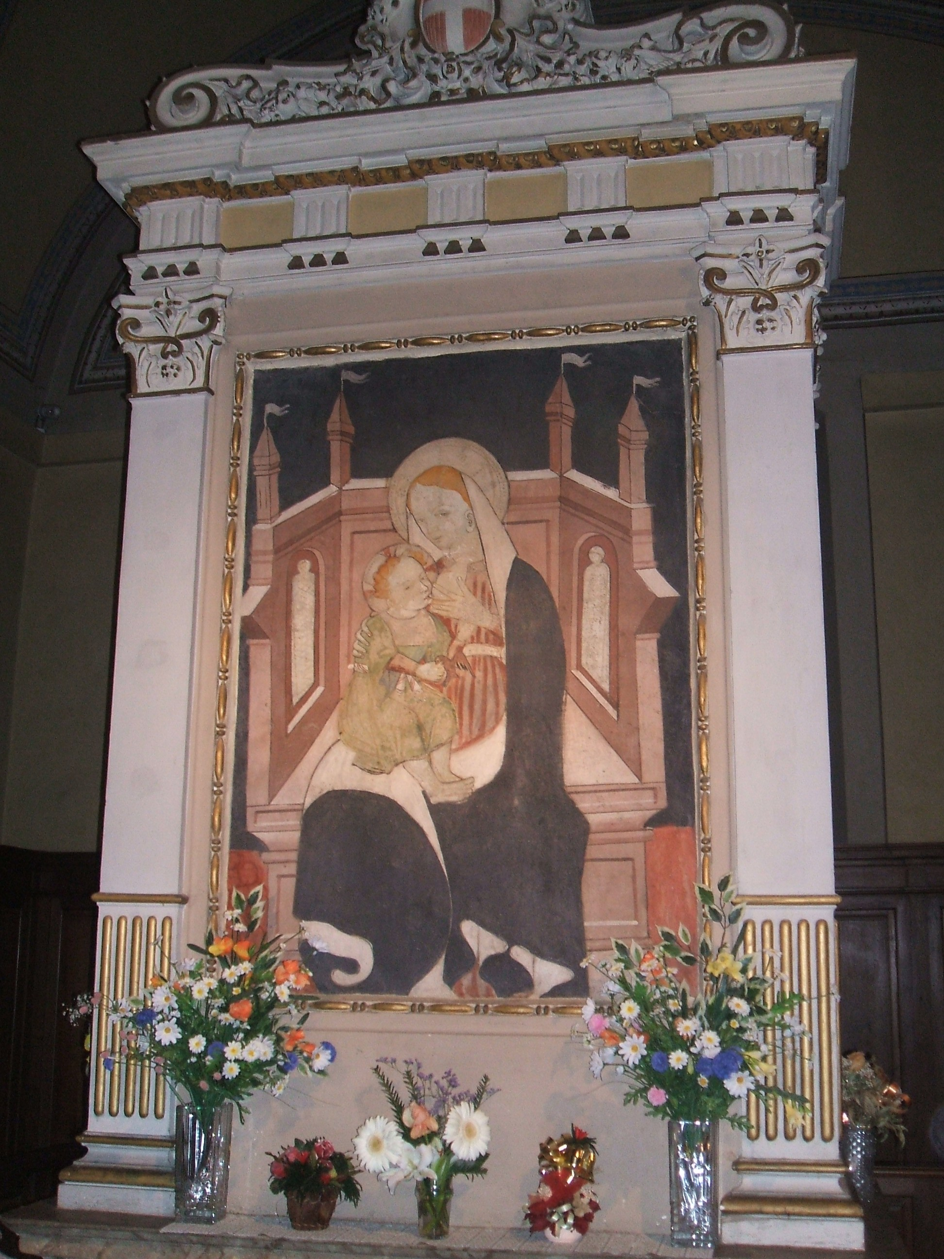 Madonna dei Laghi (Santuario della Madonna dei Laghi, ad Avigliana (Torino))